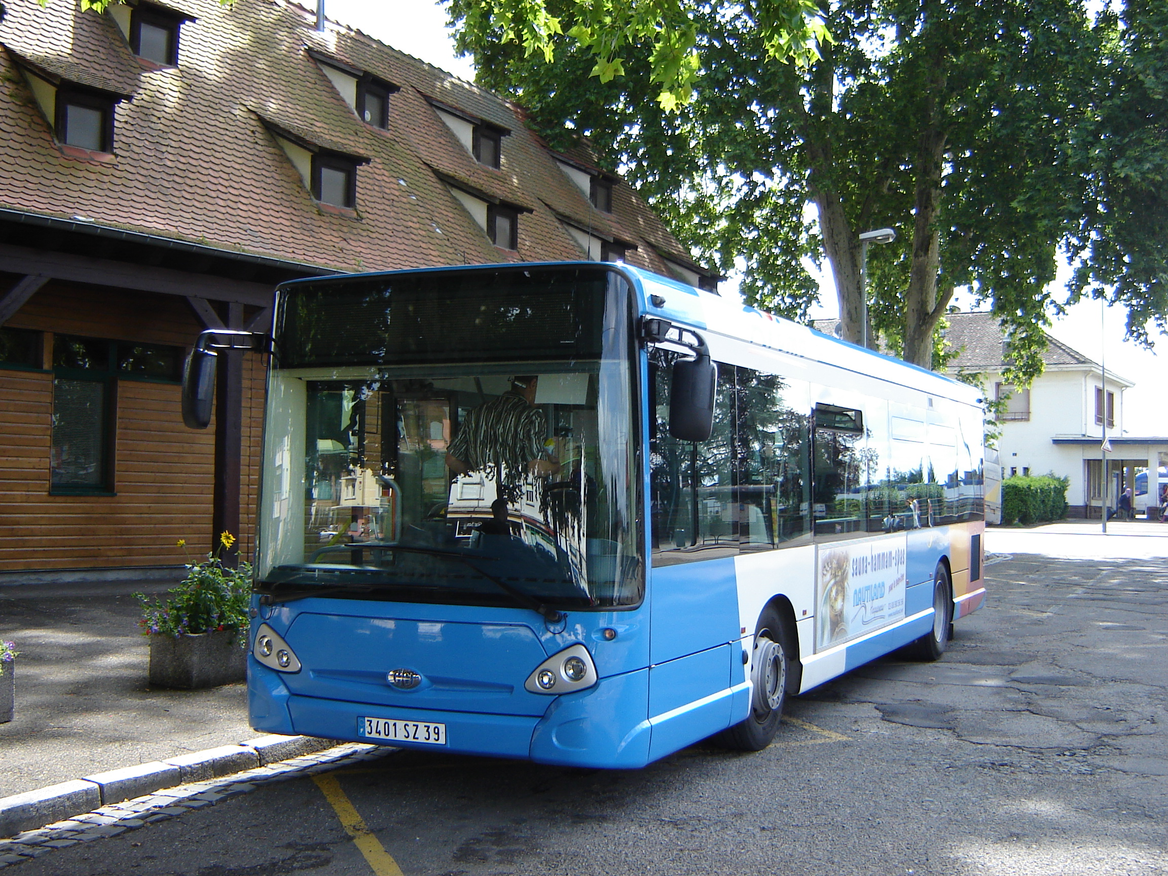 Heuliez GX 127 L du réseau RITMO d'Haguenau